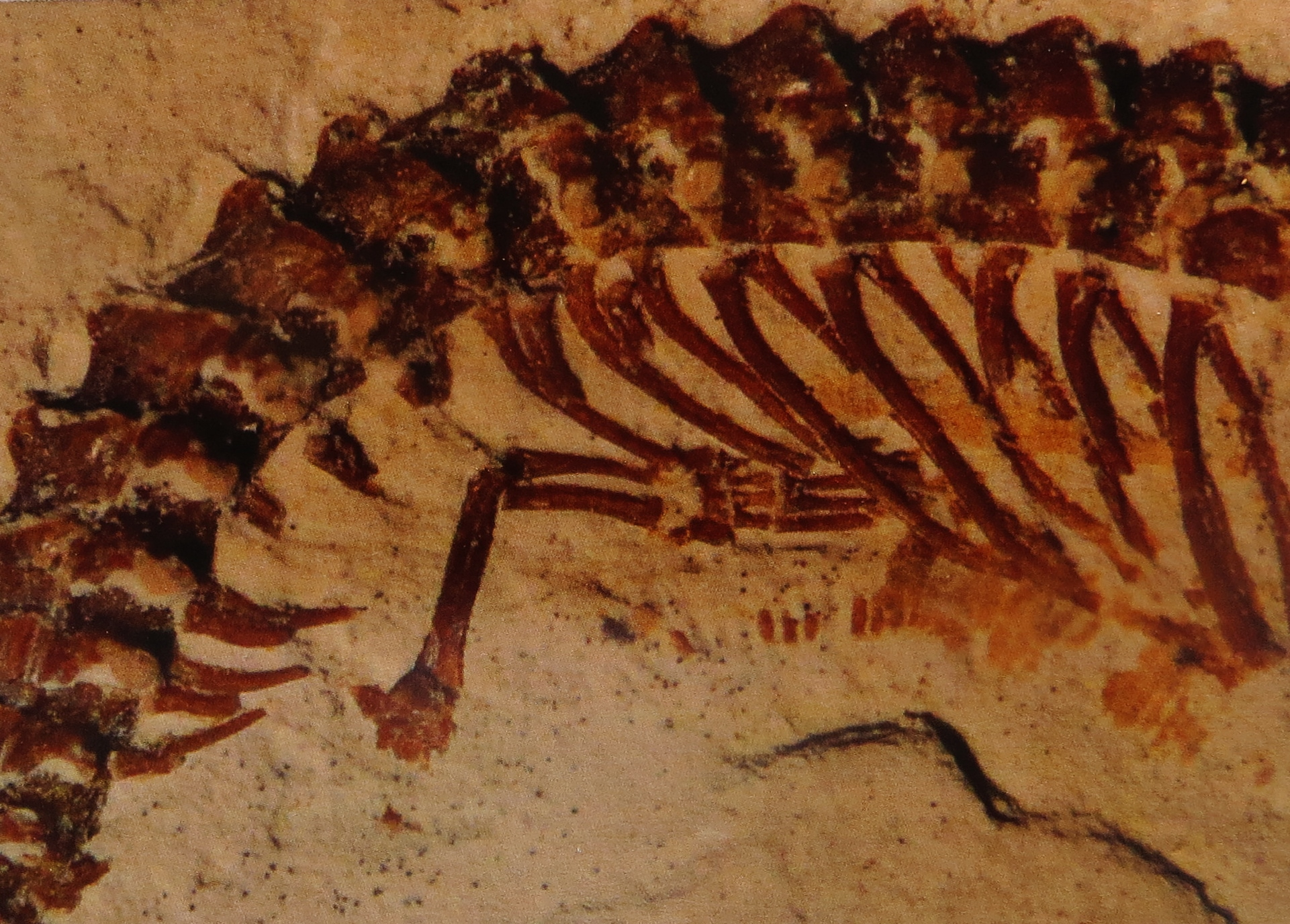 Took the picture at Burgmeister Muller Museum, Solnhofen